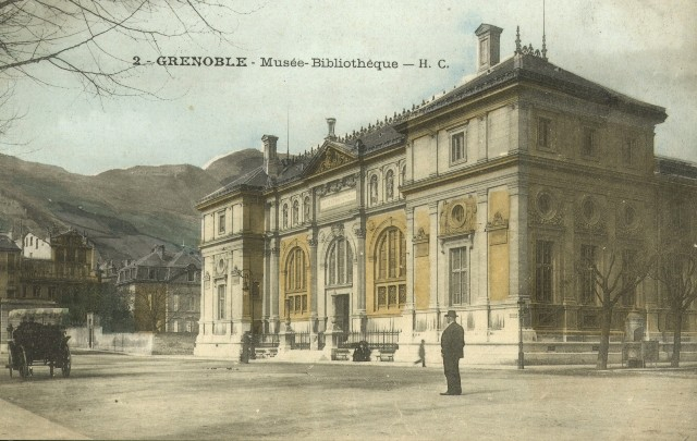 Musée-bibliothèque de Grenoble avant 1900 car on ne voit pas les rails de la ligne du tramway Gare-Saint-Roch inauguré le 9 août 1900.